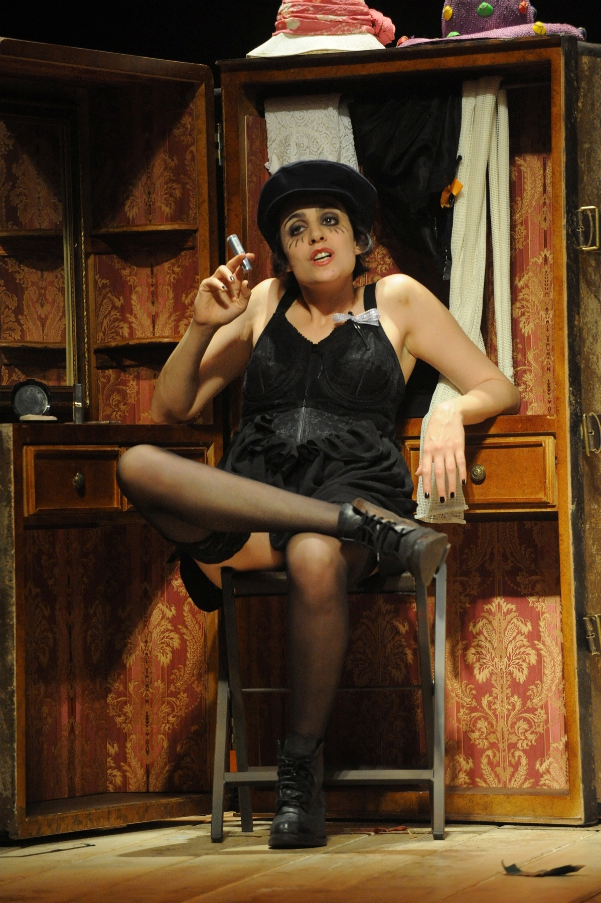 נטע שפיגלמן בשש דמויות מחפשות מחבר